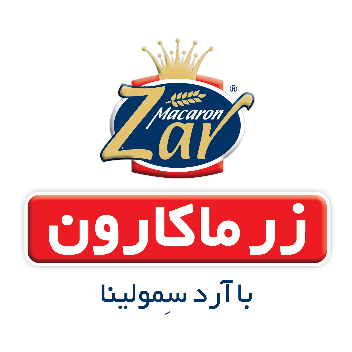 لوگوی جدید برند زرماکارون